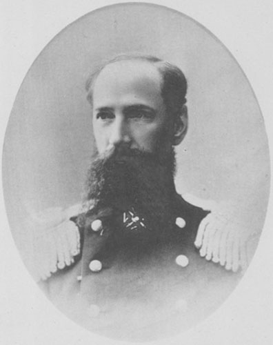 Инженер-генерал-лейтенант Русской императорской армии Александр Павлович Кобелев. Фото из Альбома портретов бывших кадетов 1-го кадетского корпуса, 1732-1863 гг., СПб., 1884 год.